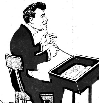 Caricature